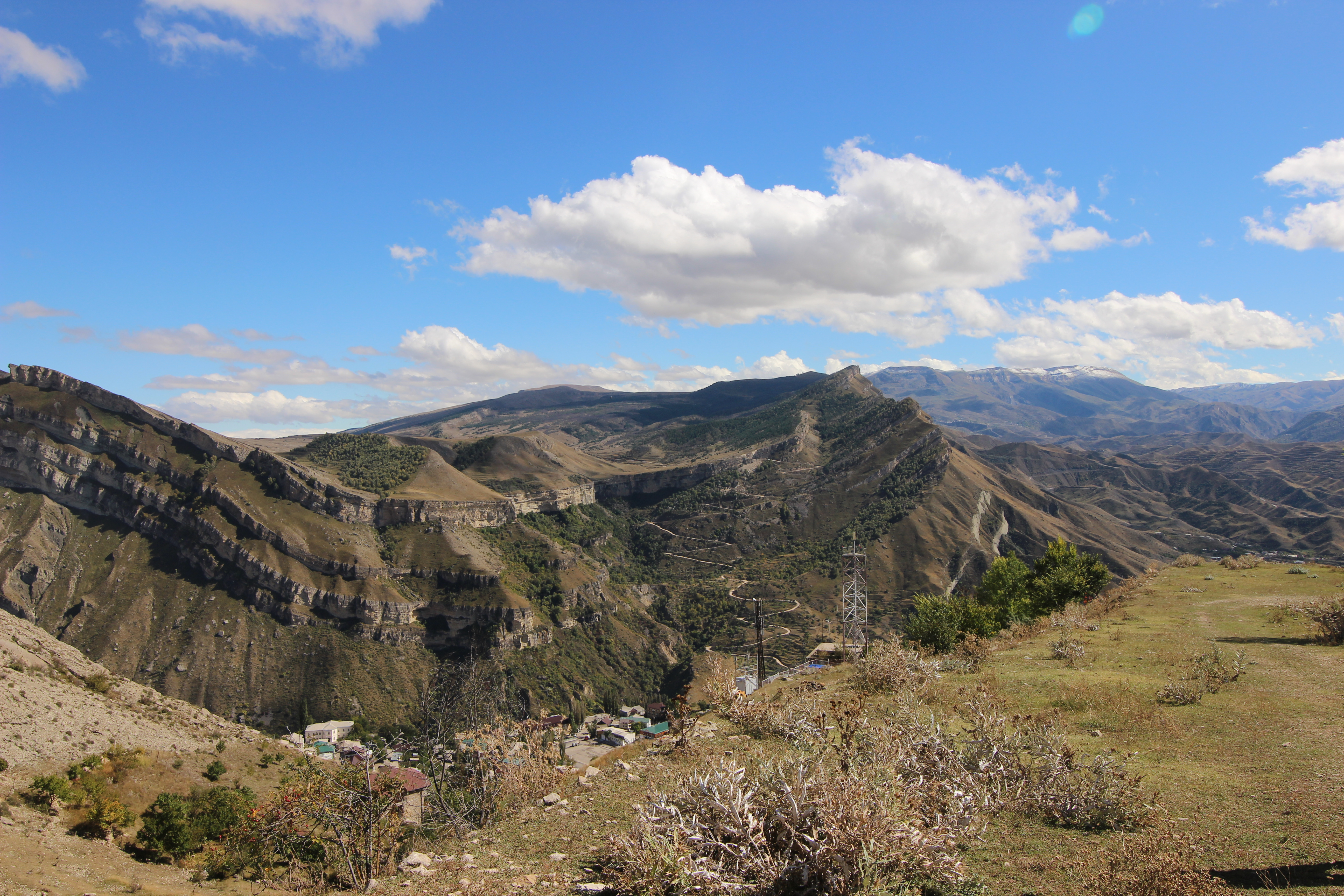 Горный ботанический сад 'Гунибское плато': Верхний Гуниб и правобережье р. Казикумухское-Койсу, Гунибский район, Дагестан This image is related to the protected area of Russia number 0500009